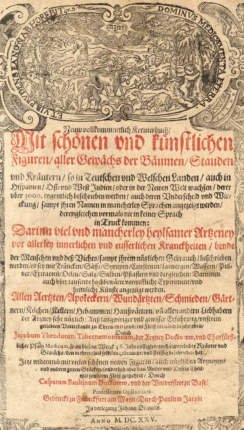 Title page of Tabernaemontanus "Neuw Vollkommentlich Kreuterbuch", 1625